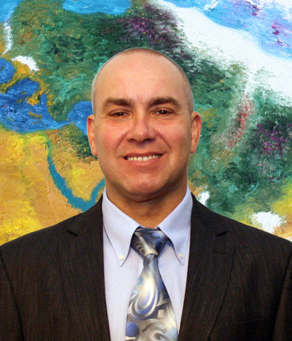 Sergey Zagraevsky, 2011.